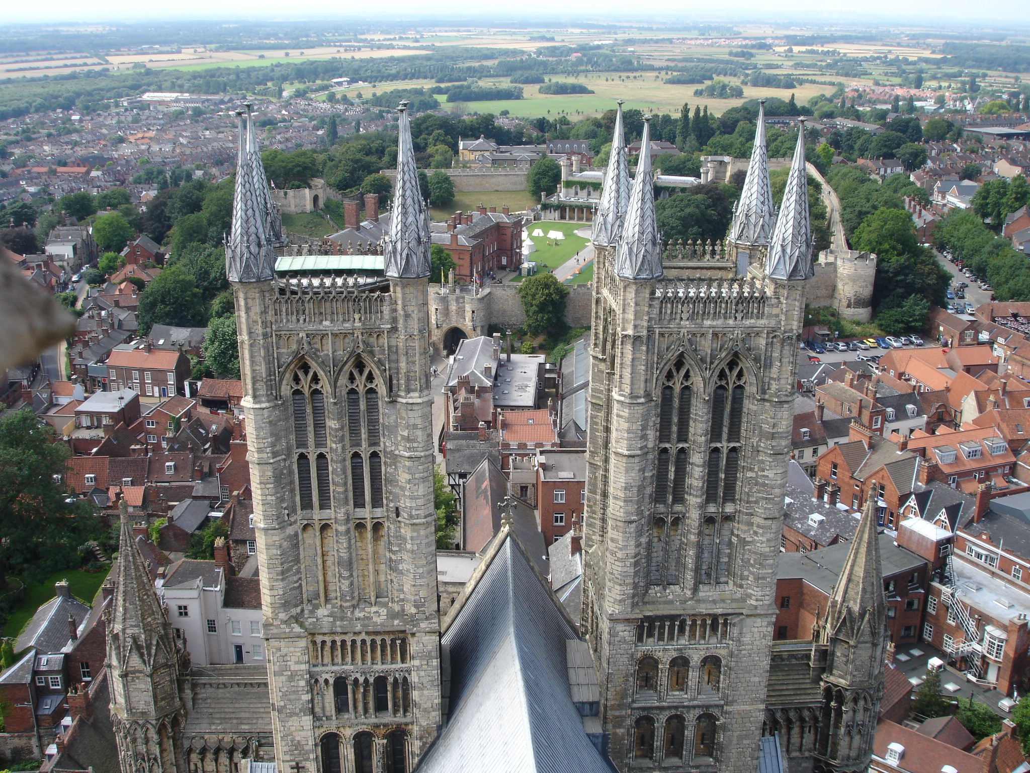 Lincoln Cathedral, view from the main tower קתדרלת לינקולן, מבט מהמגדל הראשי